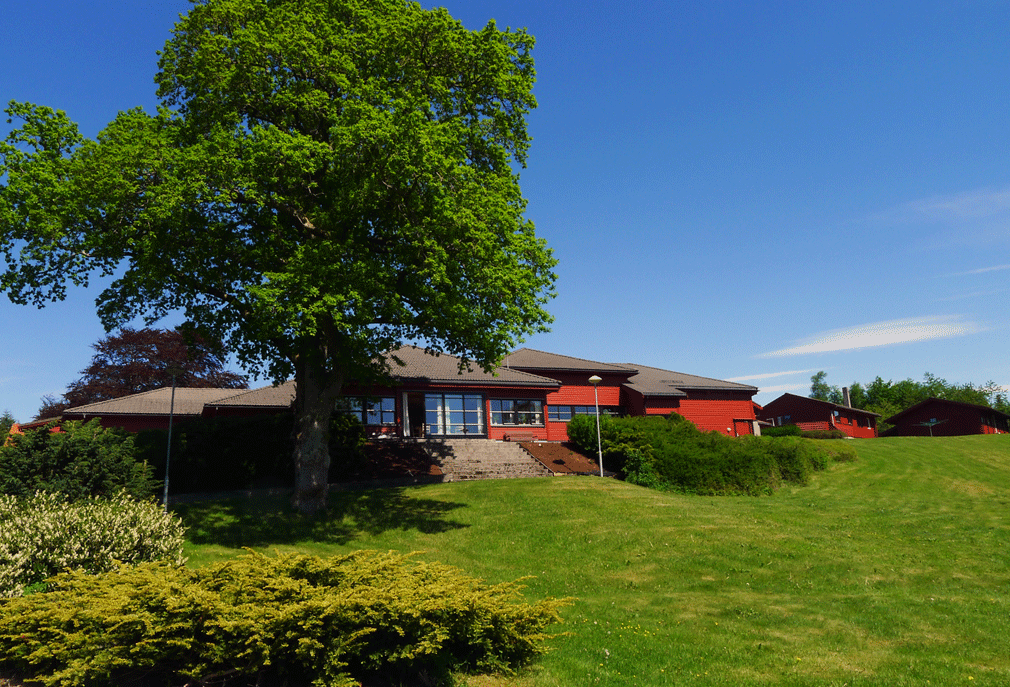 Hovedbygget Sunnhordland folkehøgskole